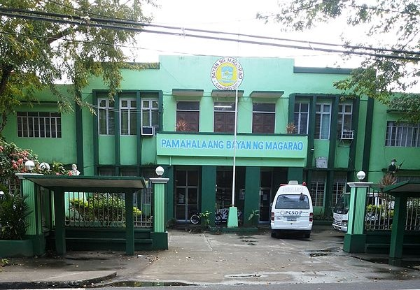 Magarao, Camarines Sur, Philippines